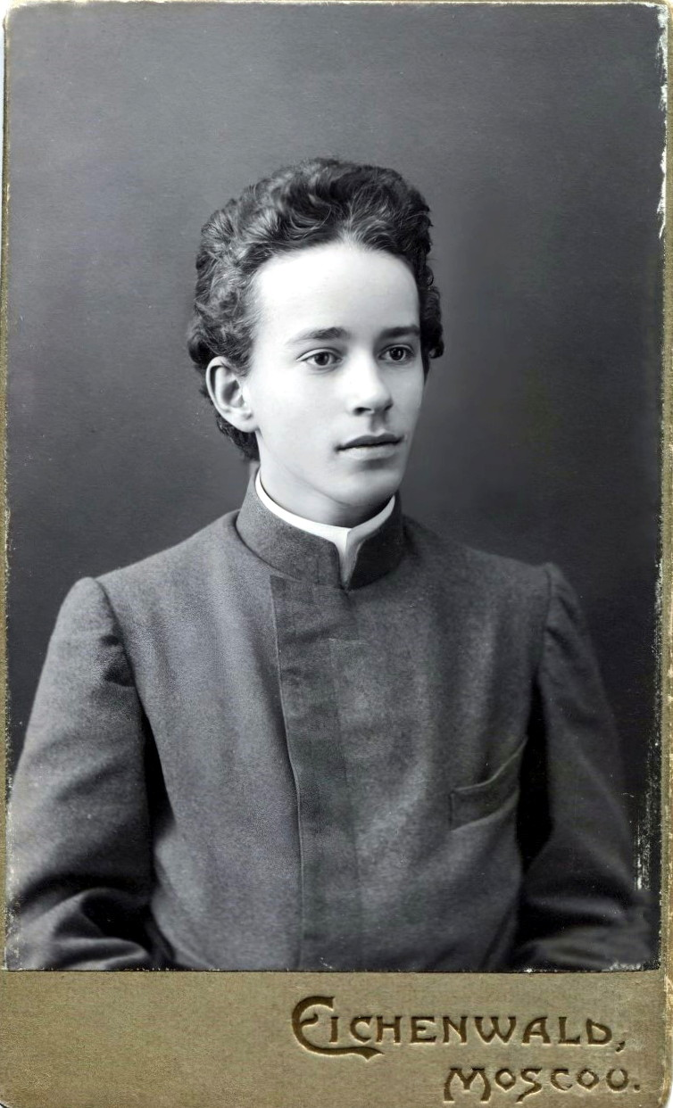 Владимир Евгеньевич Зотиков в 1904 году